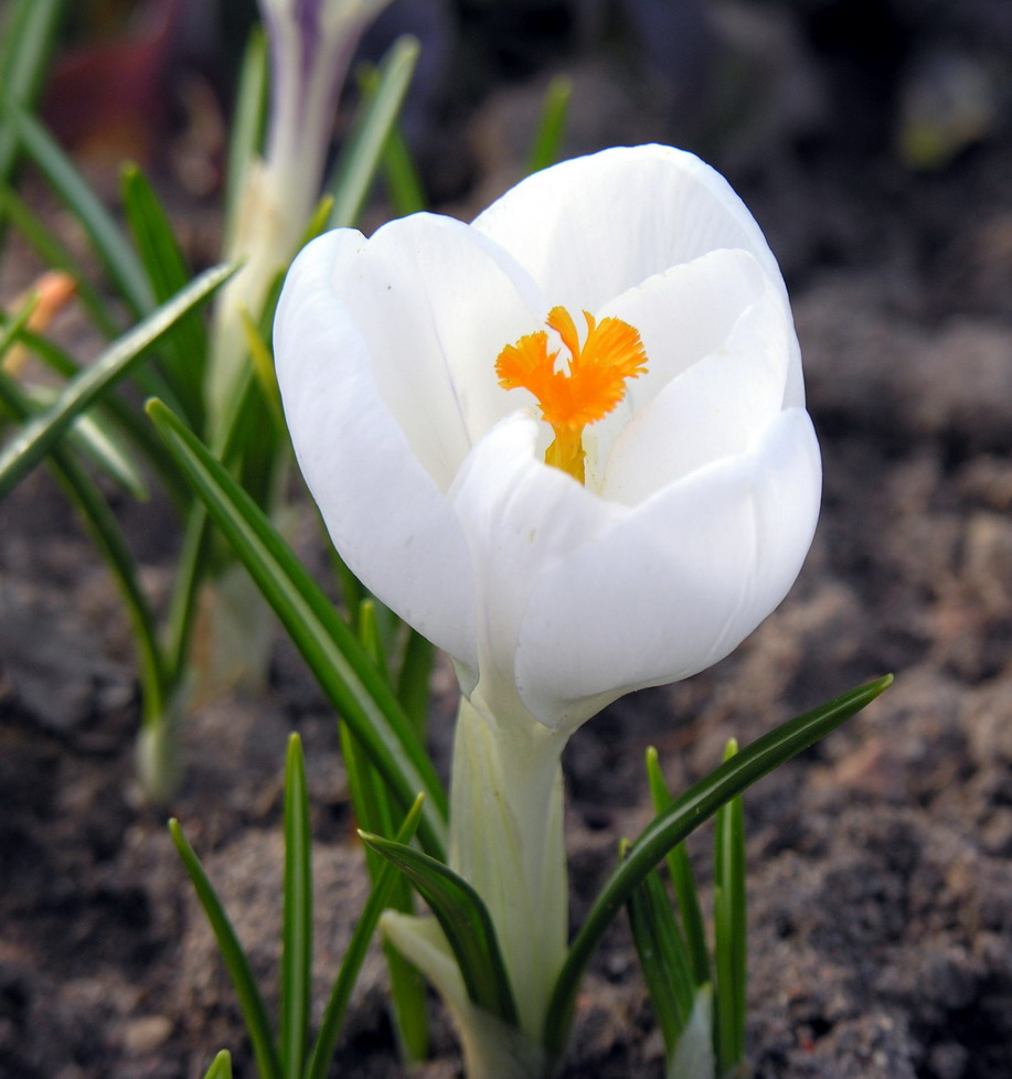 Pavasarinio kroko (Crocus vernus) žiedas Šeima. Vilkdalginiai (Iridaceae) Foto: Algirdas, 2006 m. balandžio 21 d.